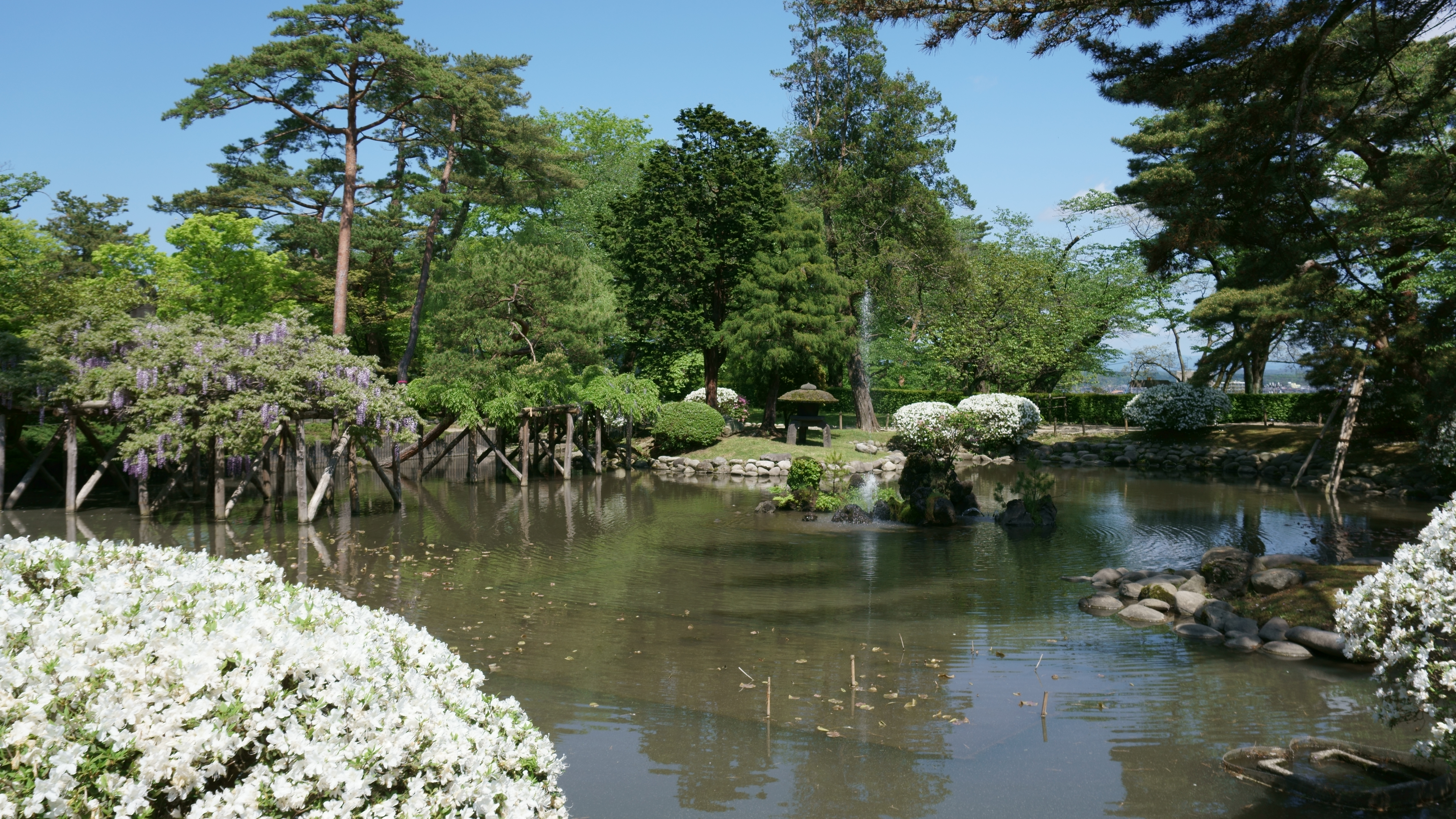 千秋公園、胡月池